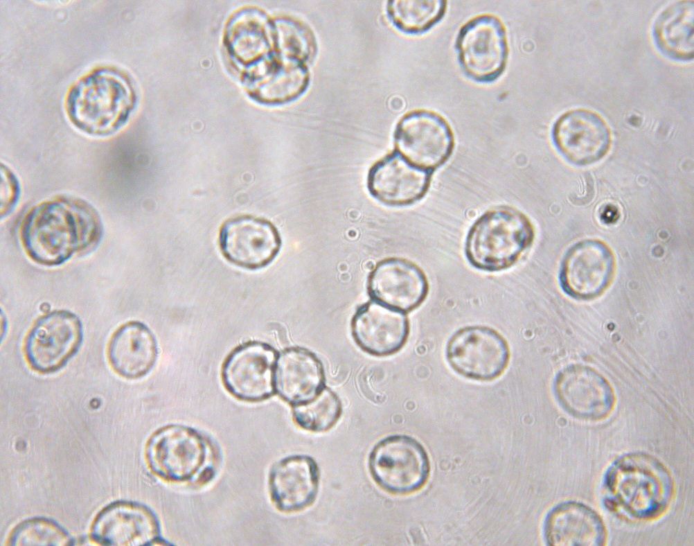 Amanita vaginata group